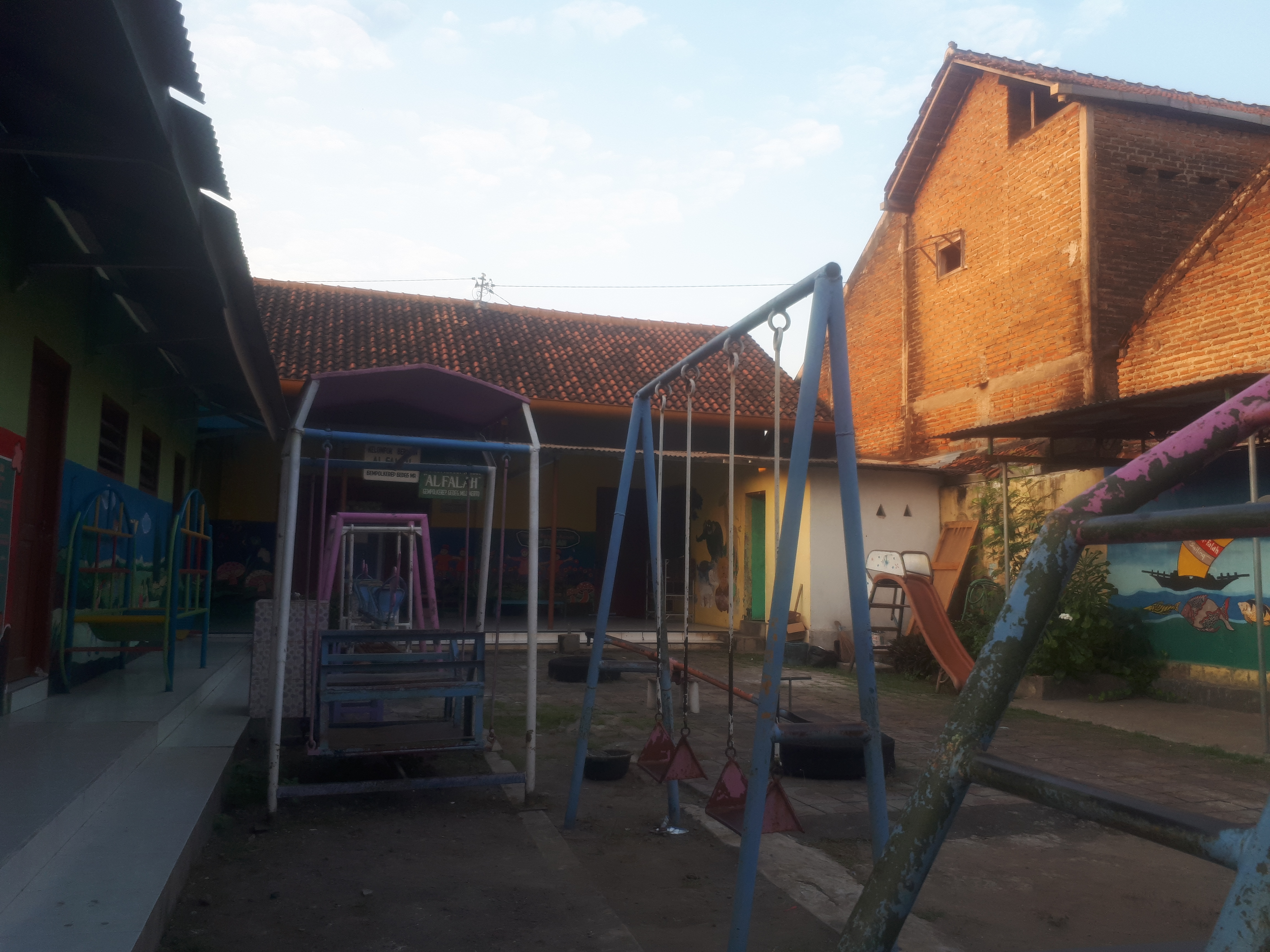 Tampak luar bangunan Stasiun Gempolkerep yang kini digunakan untuk sekolah Taman Kanak-Kanak (TK), 2020